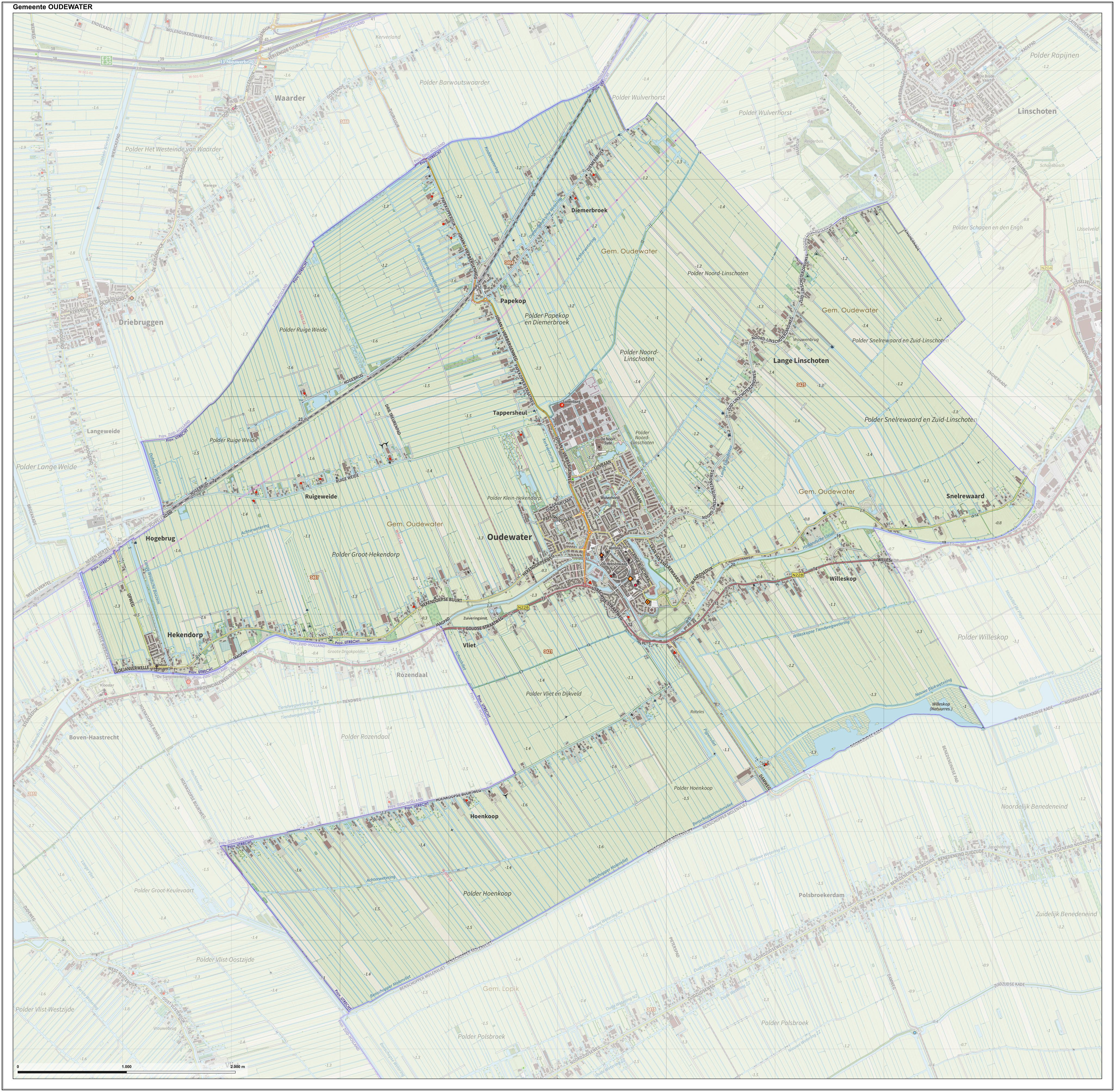 Topografische gemeentekaart. Resolutie: 400 pixels/km. Kaartbeeld samengesteld uit de open geodata van de Top10NL en Top25namen (Kadaster), Creative Commons-BY licentie. Gebouwvlakken uit open geodata BAG extract. Wegen uit de OpenStreetMap, OpenStreetMap community. Reliëfschaduw uit de Actuele Hoogtekaart AHN2. Samenstelling en kleurenschema: Jan-Willem van Aalst, met QGIS. Zie ook de Legenda.